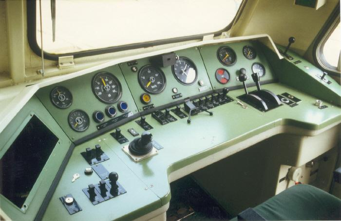 Führerpult der 240 001 aus der Zeit der Bundesbahn mit Indusi